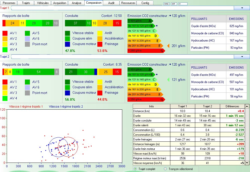 1er parcours : 6,4l, coupure injection 1’36, 36 km/h. 2ème parcours : 3,8l, coupure injection 4’35, 41km/h